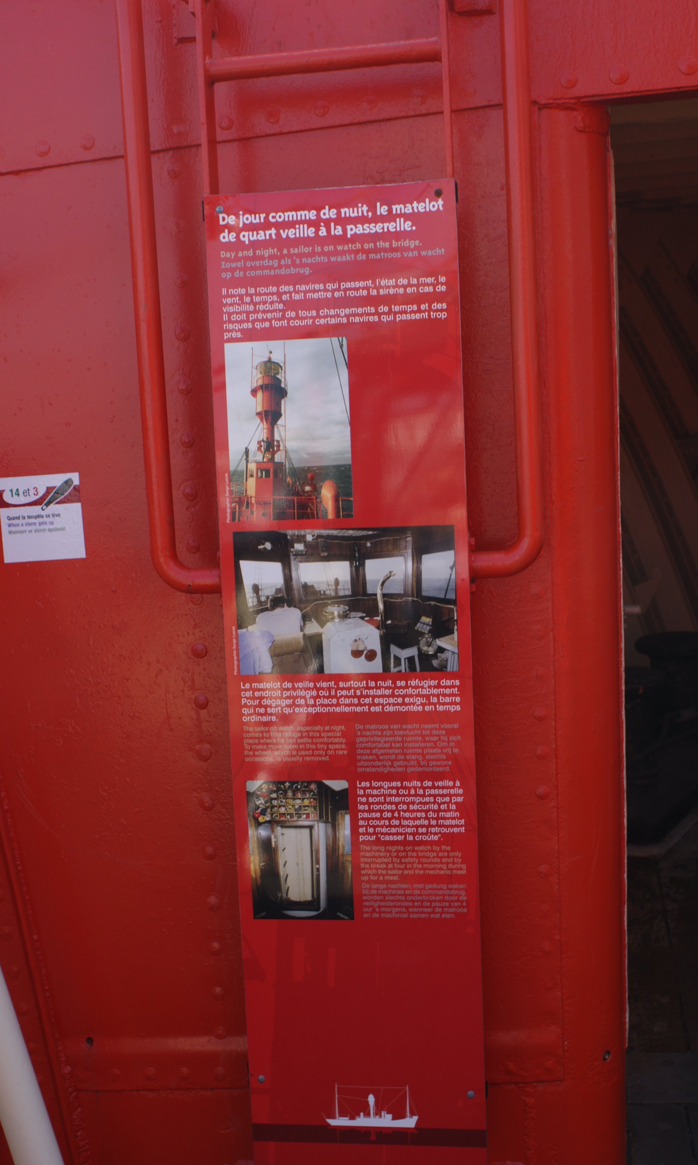 Bateau feu Sandettié (Dunkerque) - panneau étape de la visite